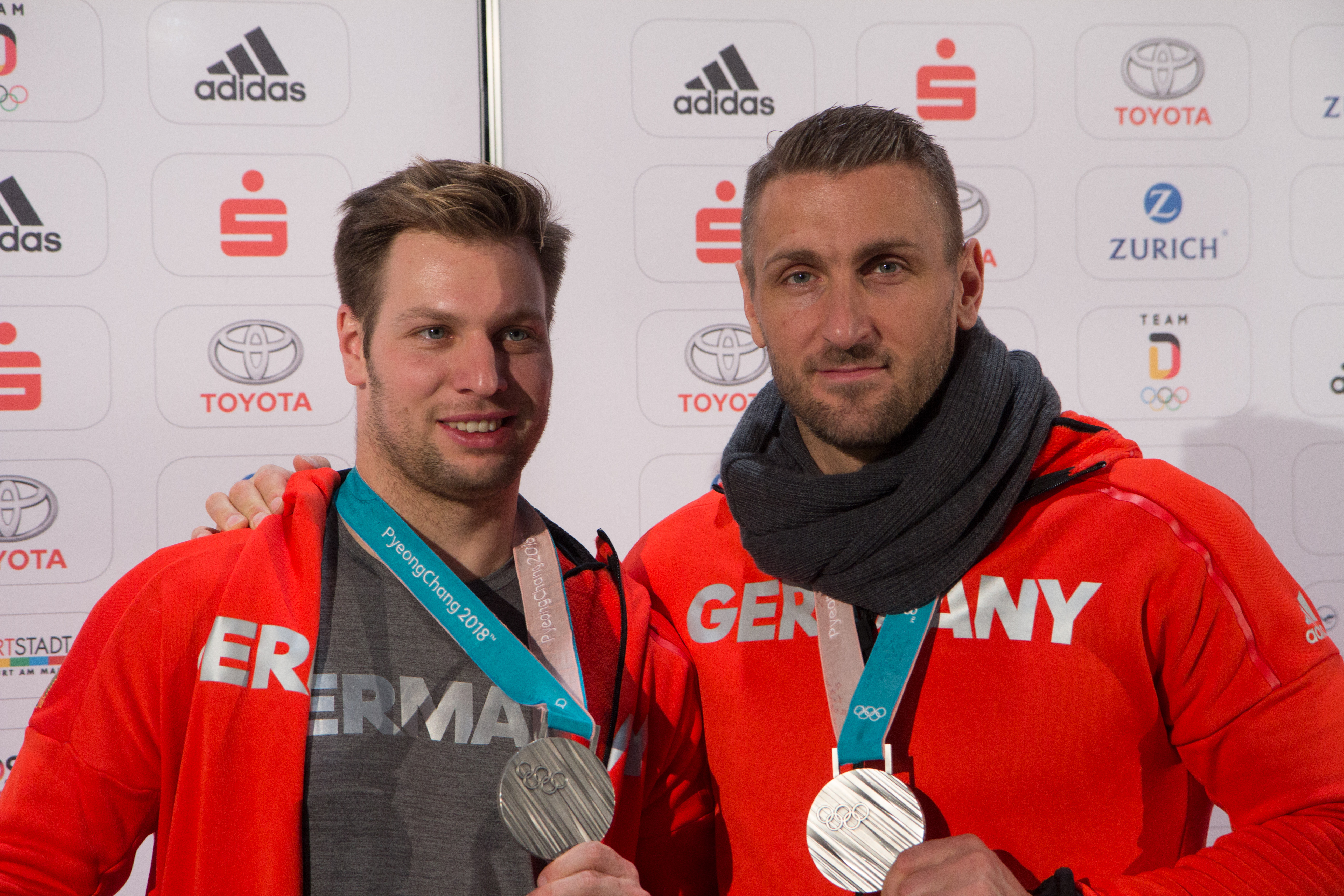 Ankunft der deutschen Olympiamannschaft am 26. Februar 2018 mit Flug LH713 auf dem Frankfurter Flughafen.